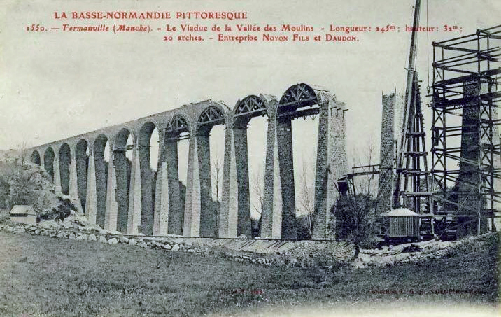 Construction du viaduc de Fermanville, Normandie, France.